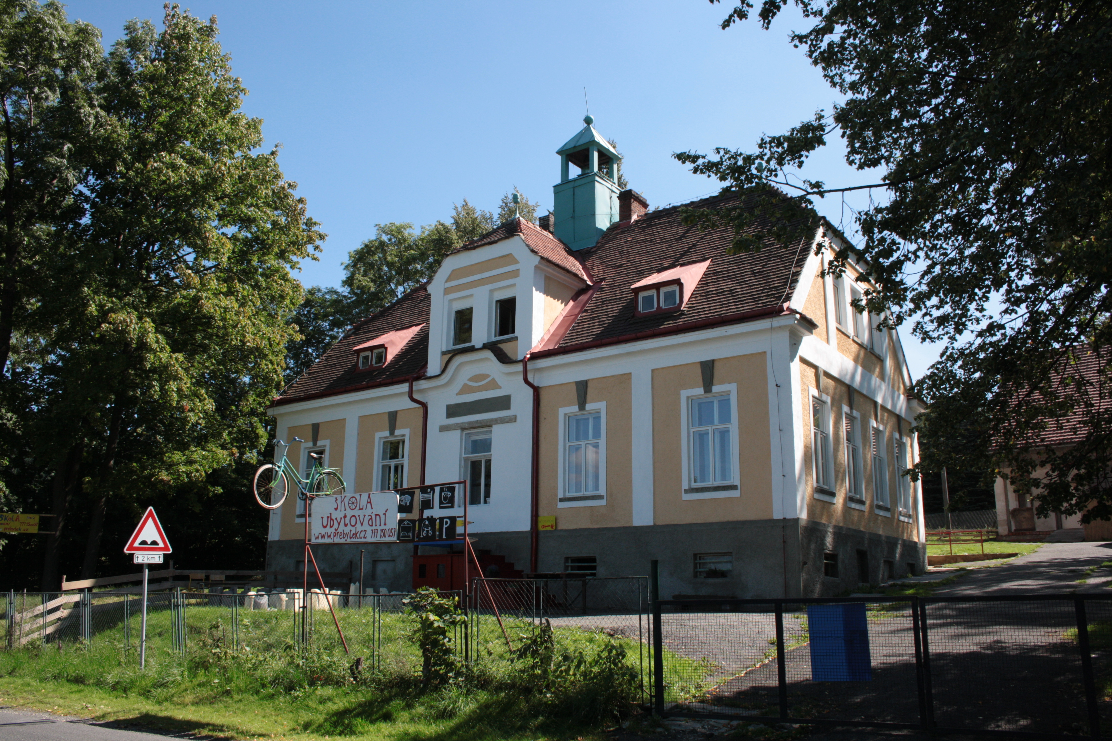 This photograph was taken with a DSLR from WMCZ's Camera grant. Bývalá škola v Přebytku (dům čp. 248 v Ludvíkově pod Smrkem).